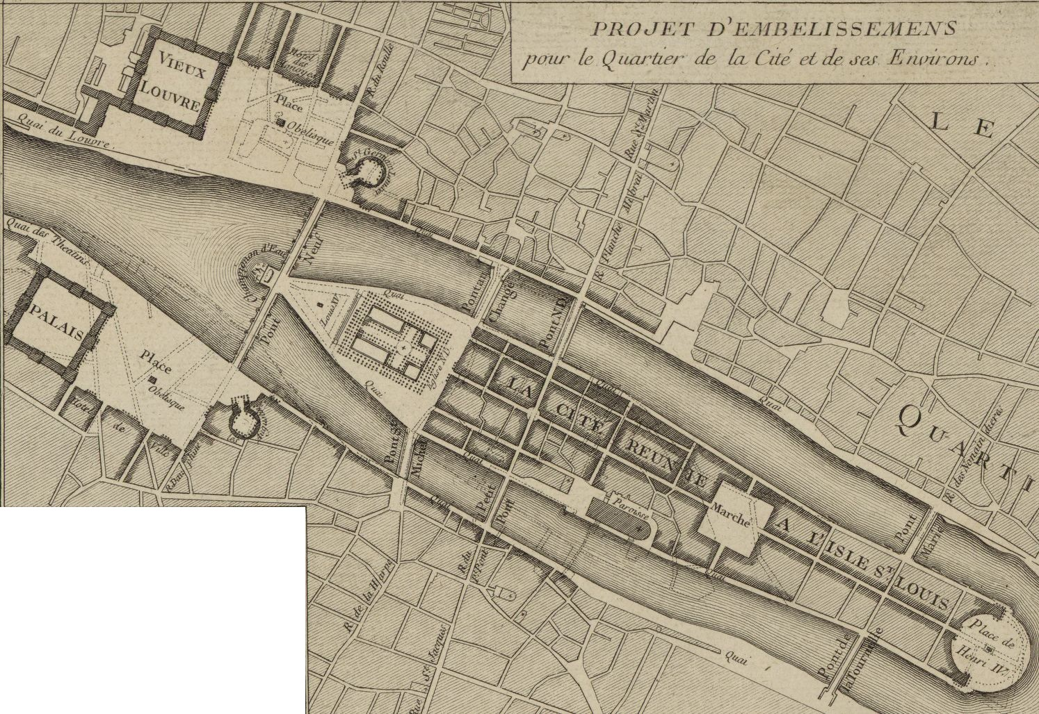 Partie du Plan général de Paris figurant le projet de réunion des îles de la Cité et Saint-Louis, dessiné par Pierre Patte.